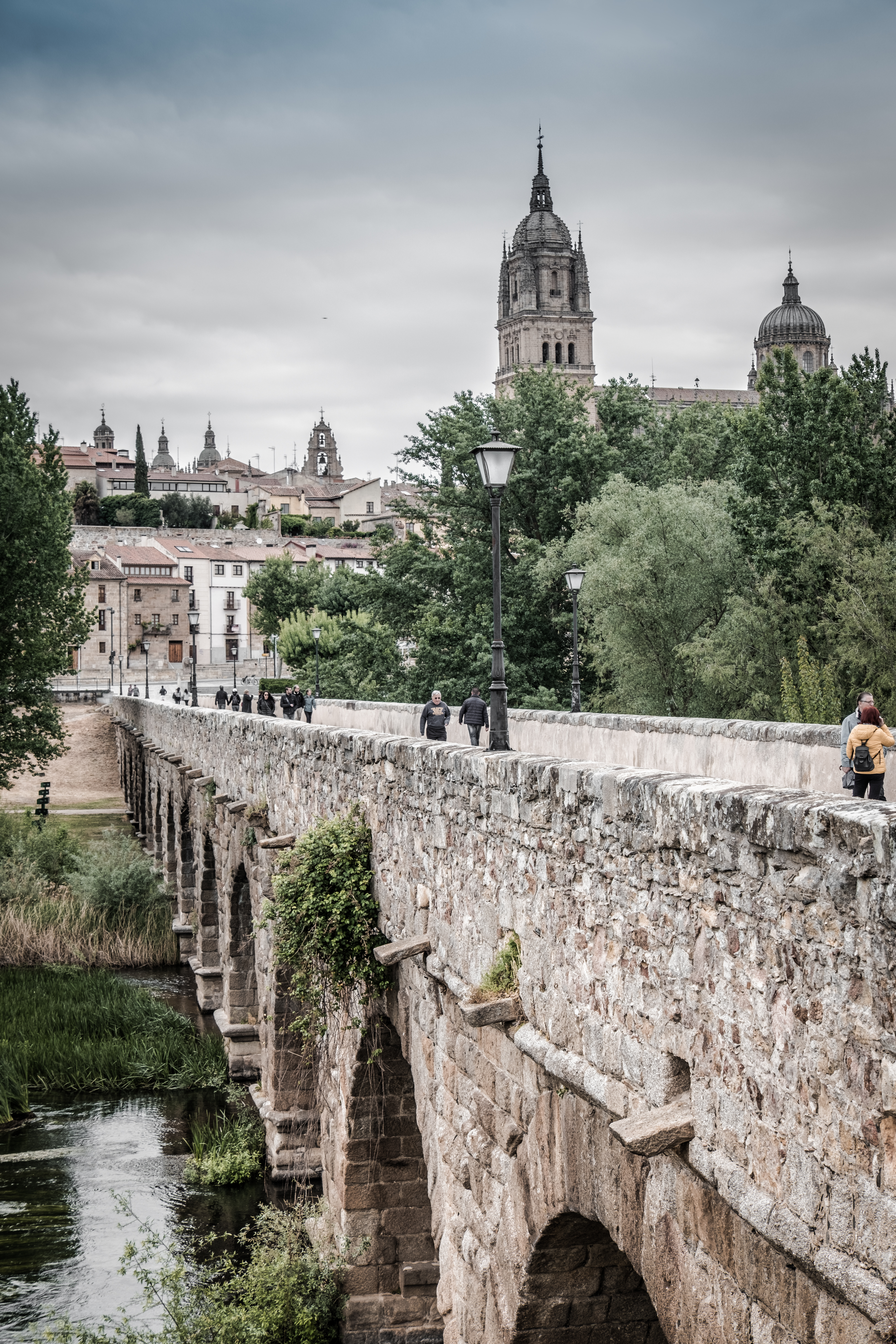 El Puente Mayor del Tormes es un puente romano que cruza el río Tormes en Salamanca. Se discute si fue construido en la época de Nerón, Trajano o Adriano.